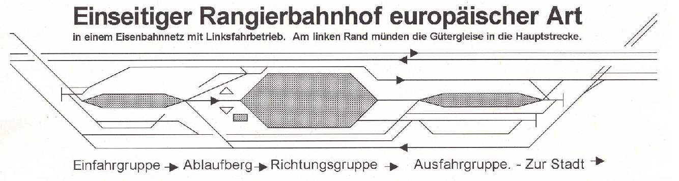 Grundsätzliches Schema der Geleiseanlagen eines Rangierbahnhofes.